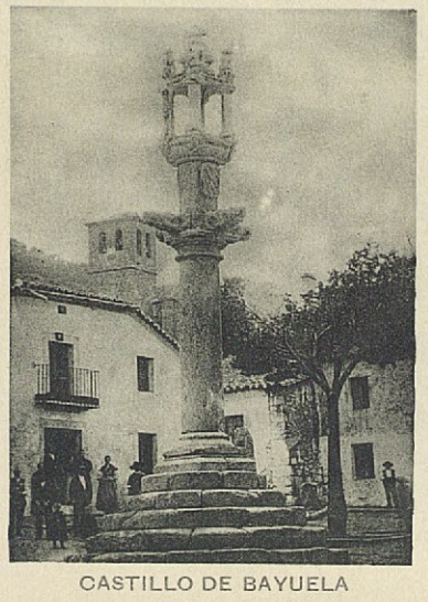 Castillo de Bayuela